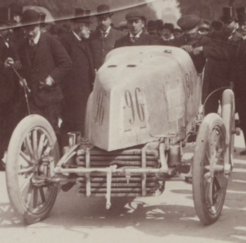 [Collection Jules Beau. Photographie sportive] : T. 21. AnnÃ©e 1903 / Jules Beau : F. 25v. [Paris - Madrid, Tuileries, 19 - 22 mai 1903]